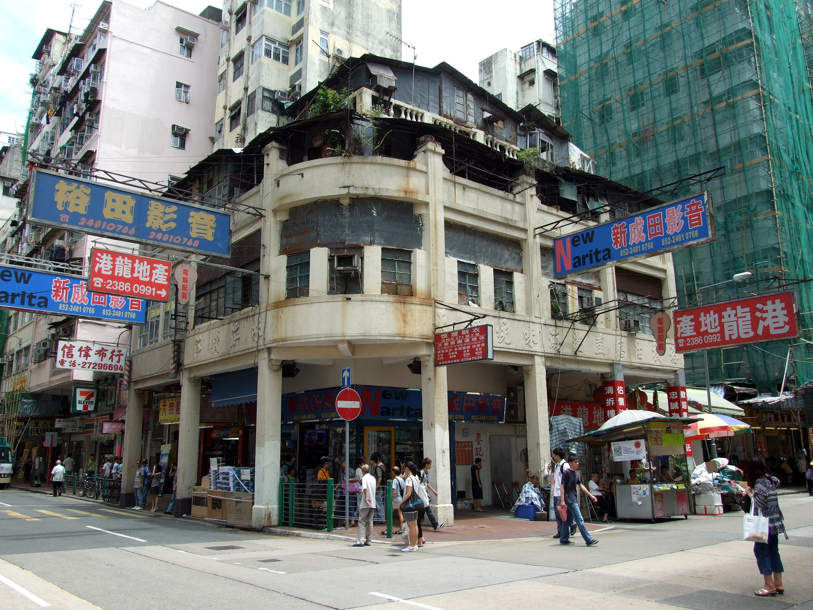 中文（香港）: 汝州街269、271號